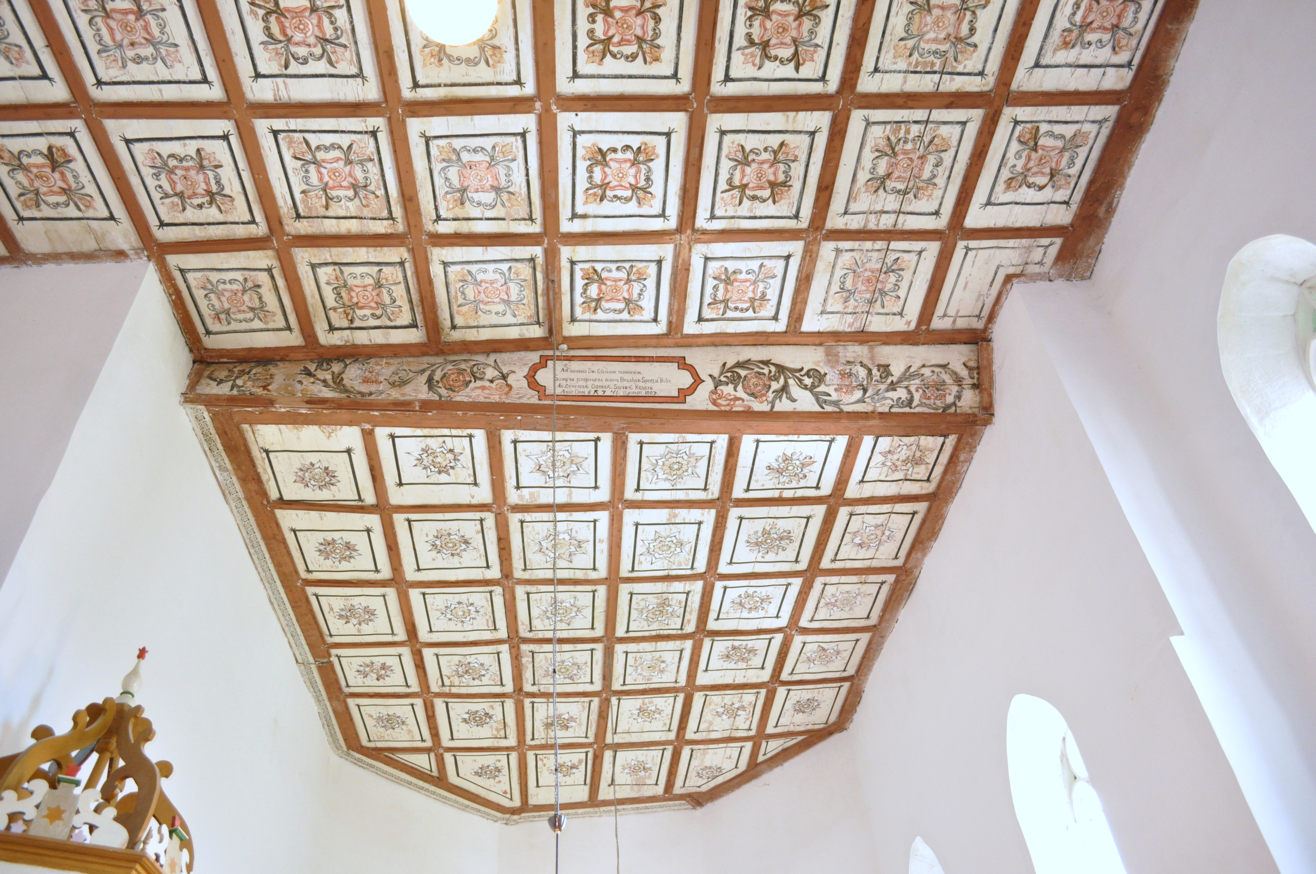 Biserica reformată, sat Horoatu Crasnei; comuna Horoatu Crasnei